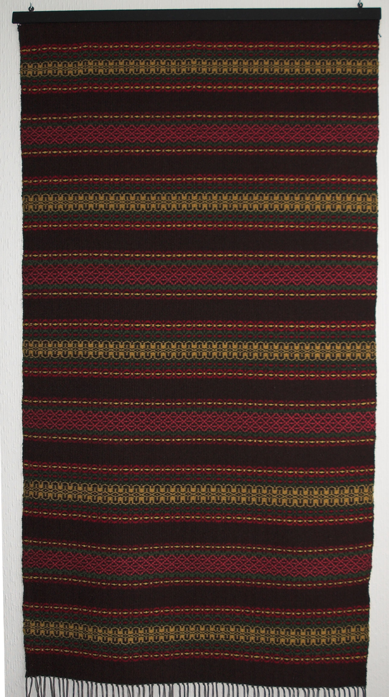 Åkle, Bjørnsrud, Flesberg